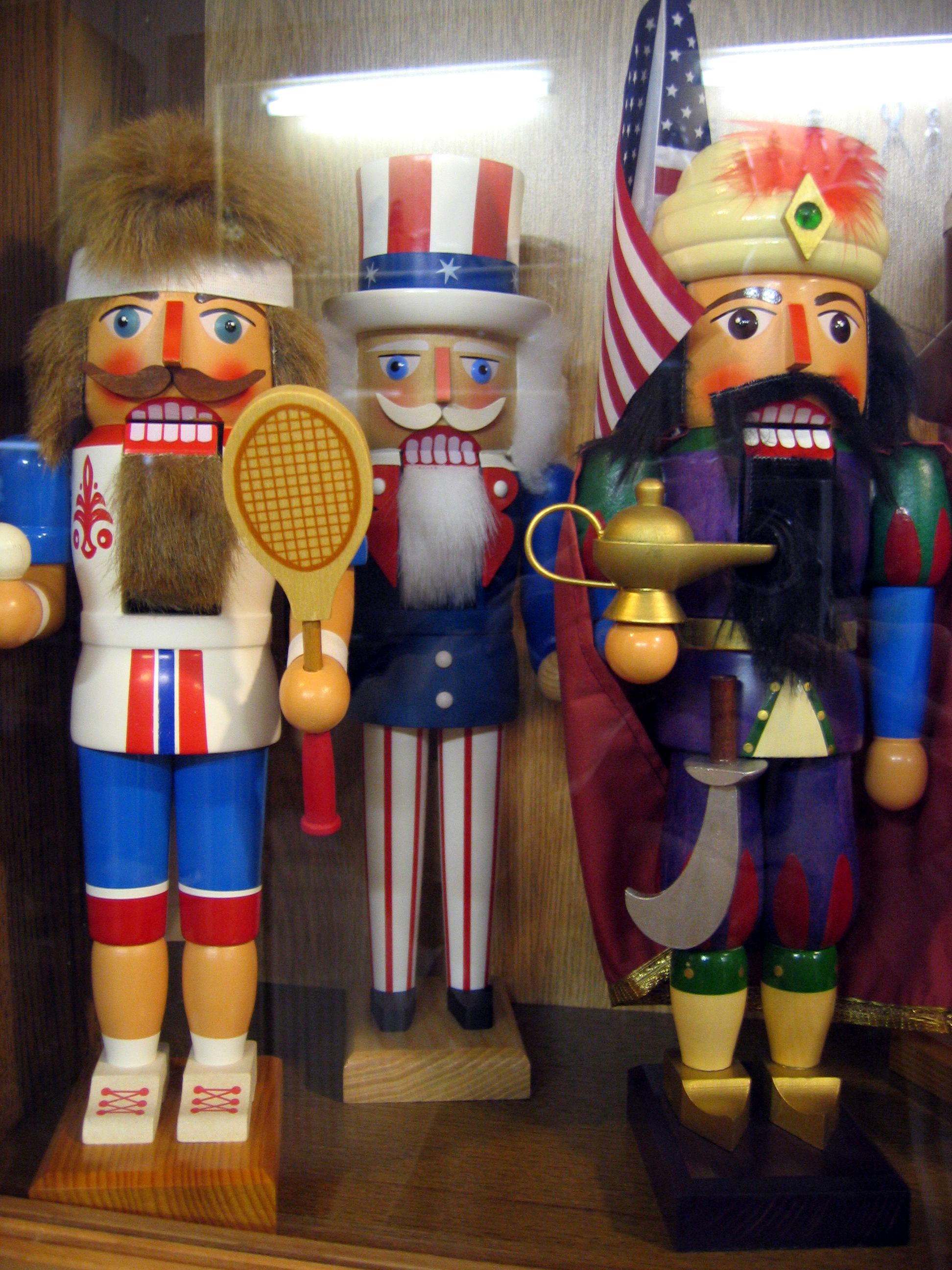 Nussknackermuseum Neuhausen/Erzgebirge